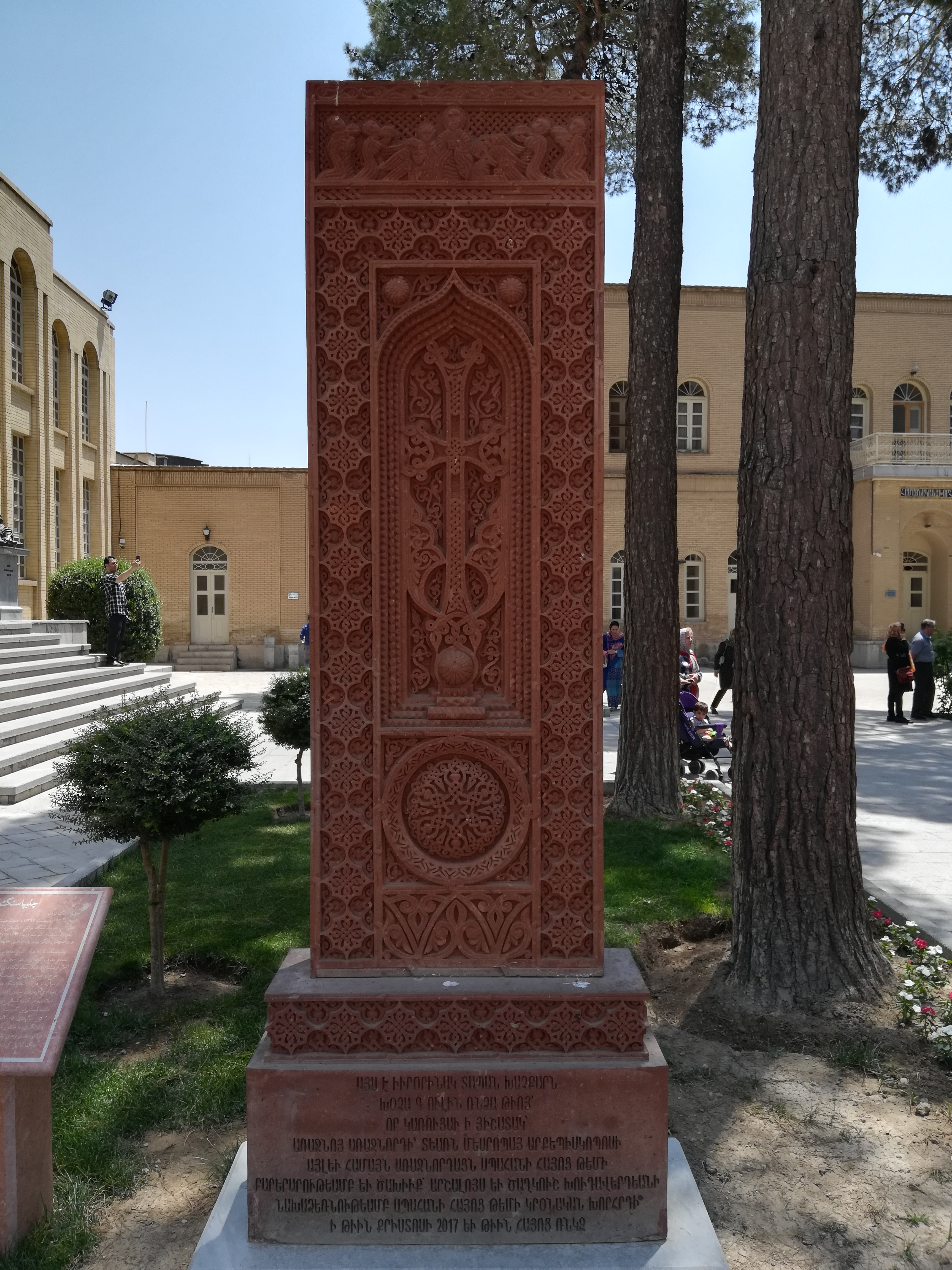 چلیپاسنگ در محوطه کلیسا وانک اصفهان